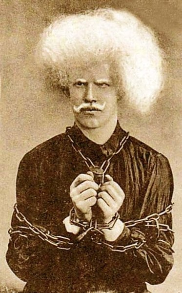 Karl Breu (1884 - 1953), Český iluzionista a eskapolog německé národnosti.